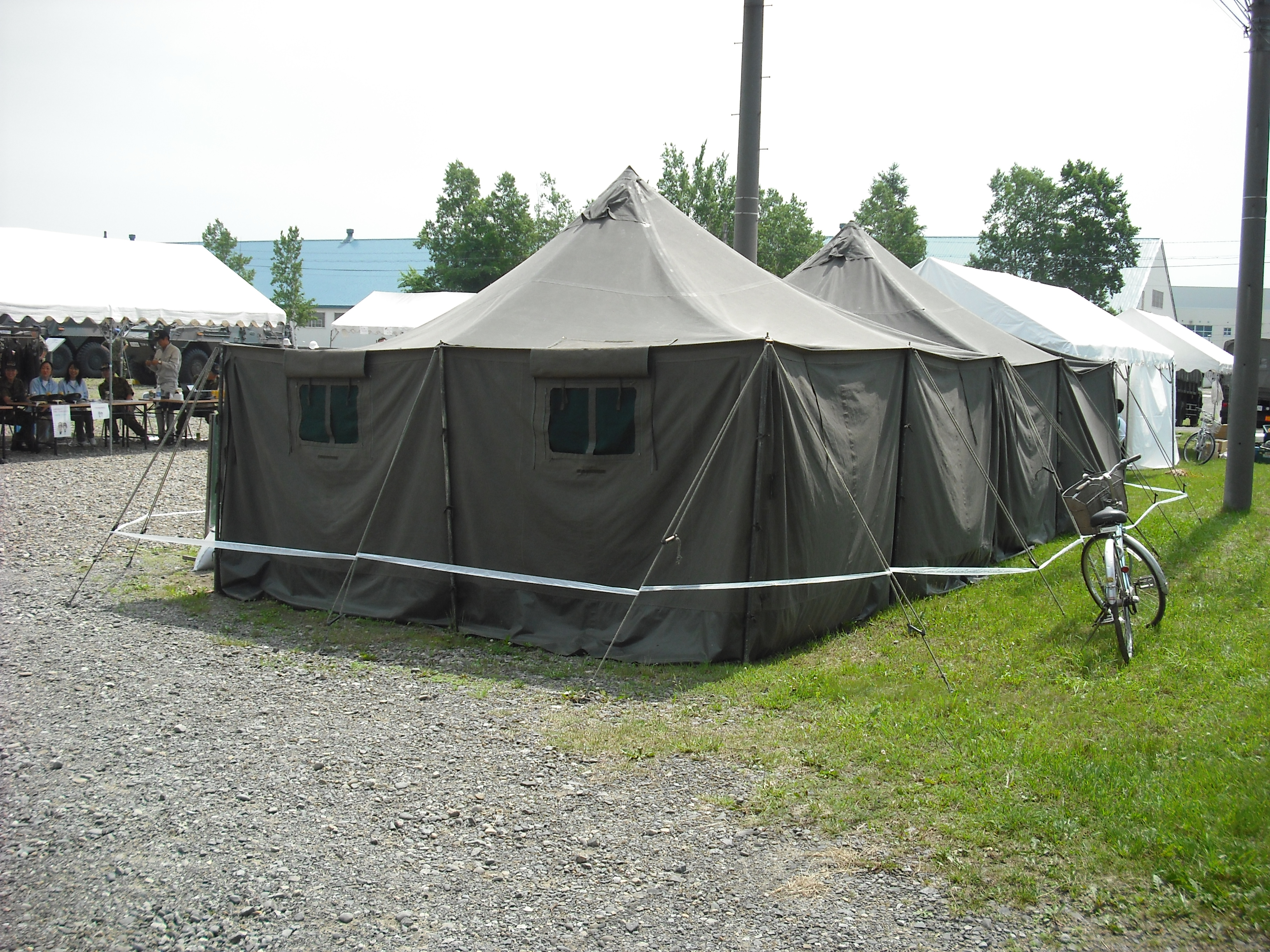 業務用天幕2号（改）、2佐以上の指揮官の宿泊や中隊本部等の幹部の宿泊、幕僚活動用に使用する。